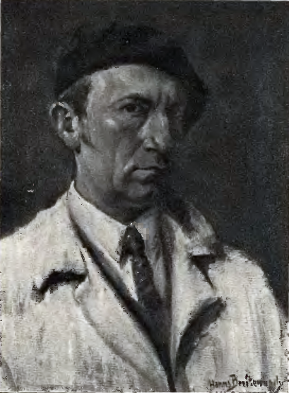 Selbstporträt des Künstlers Hanns Breitenbach